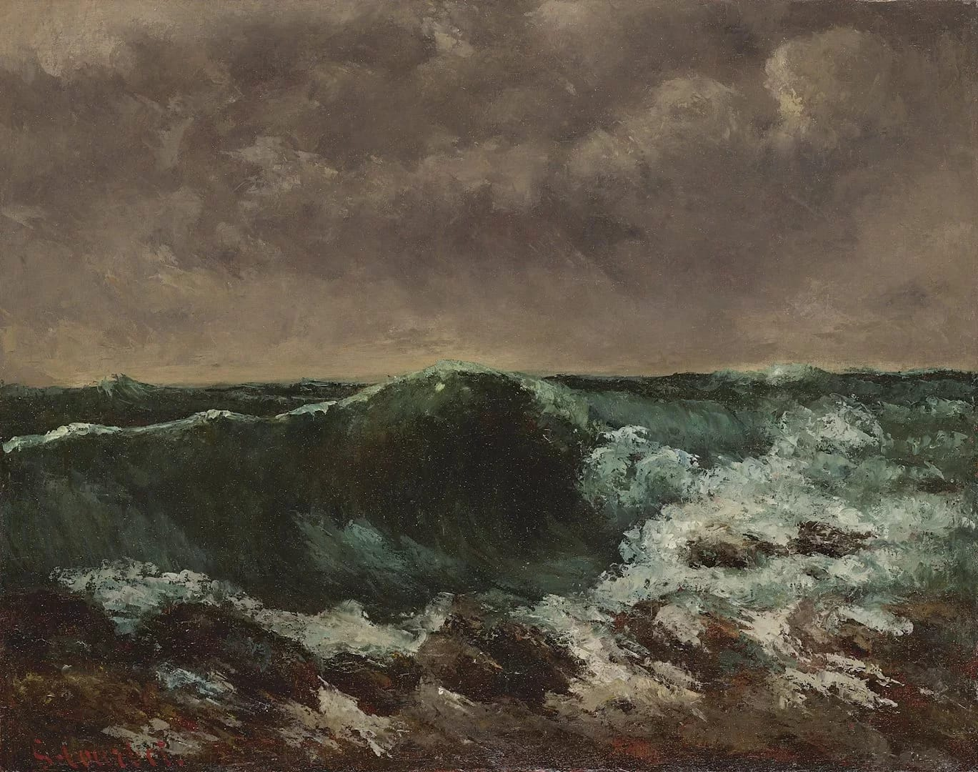 L'onda Courbet 1865, Albert e Henri Hehct